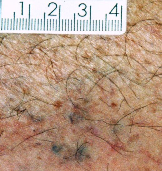 Equimosis a la cama